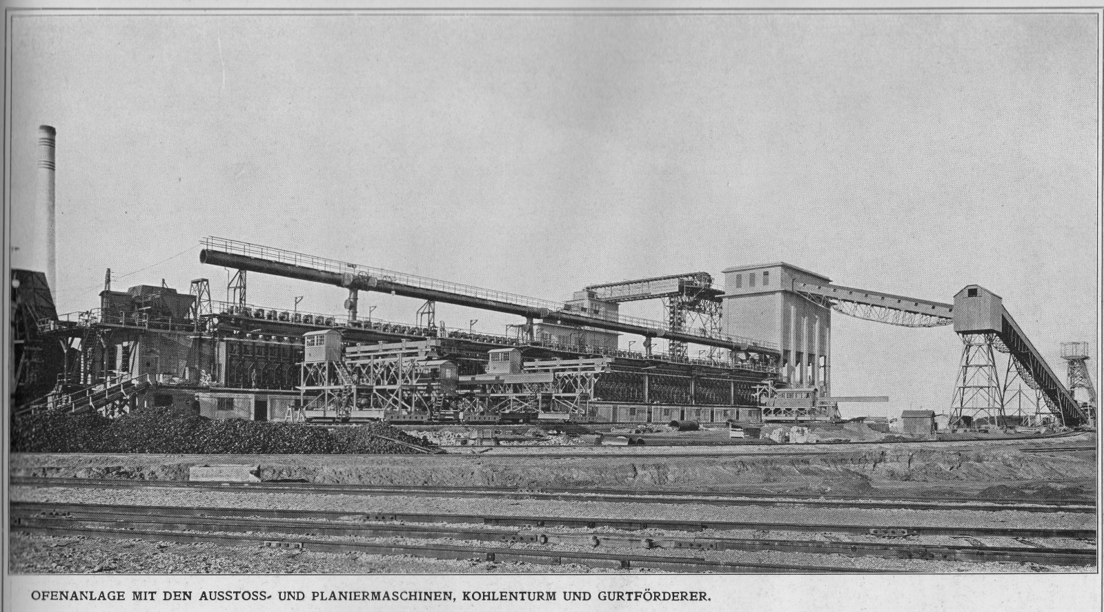 Städtische Gaswerk Leopoldau: Ofenanlage mir den Ausstoss- und Planiermaschinen, Kohlenturm und Gurtförderer, 1911